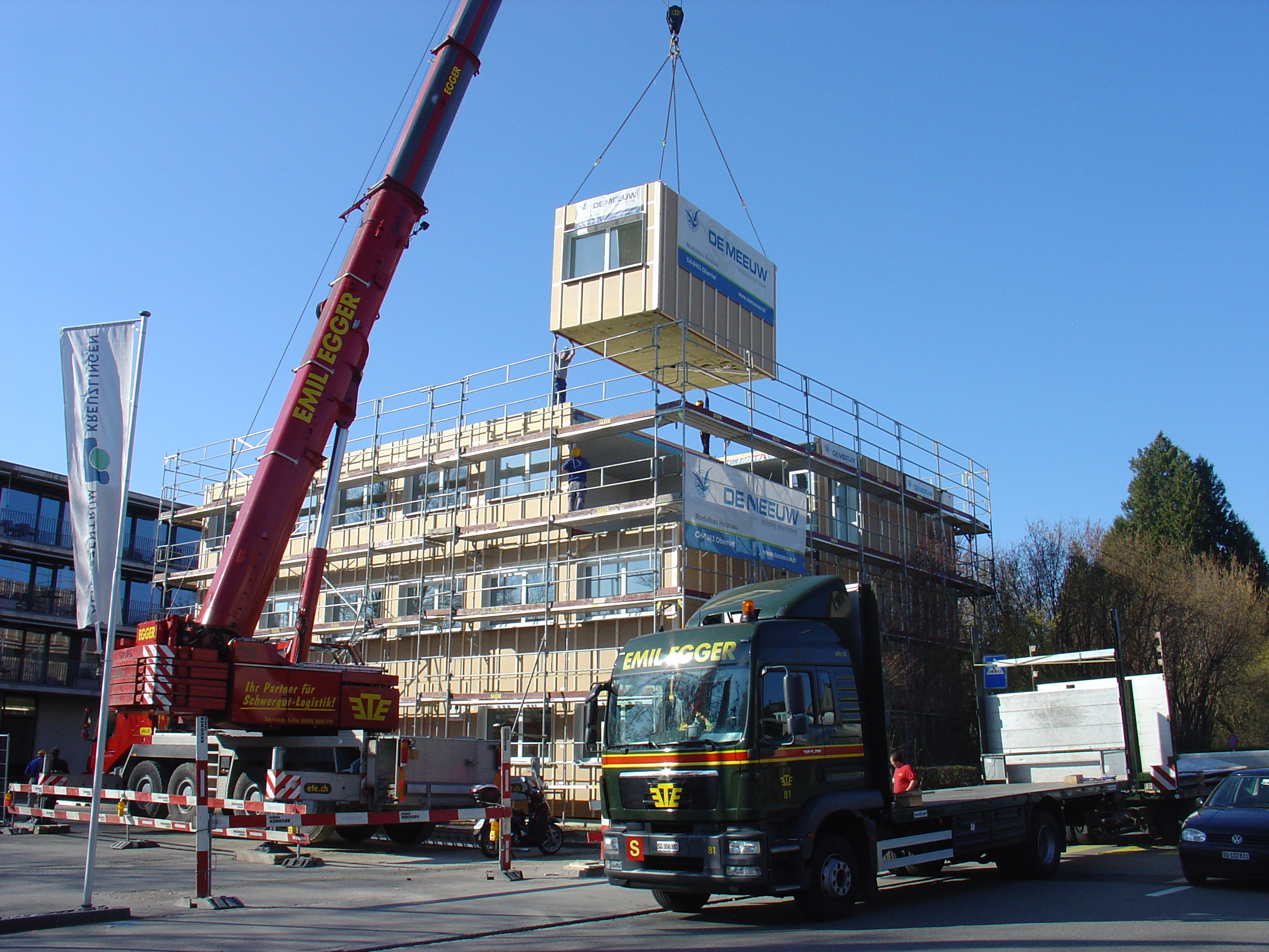 Die Montage von Hybrid-Modulen beim Alterszentrum Kreuzlingen, 2011.